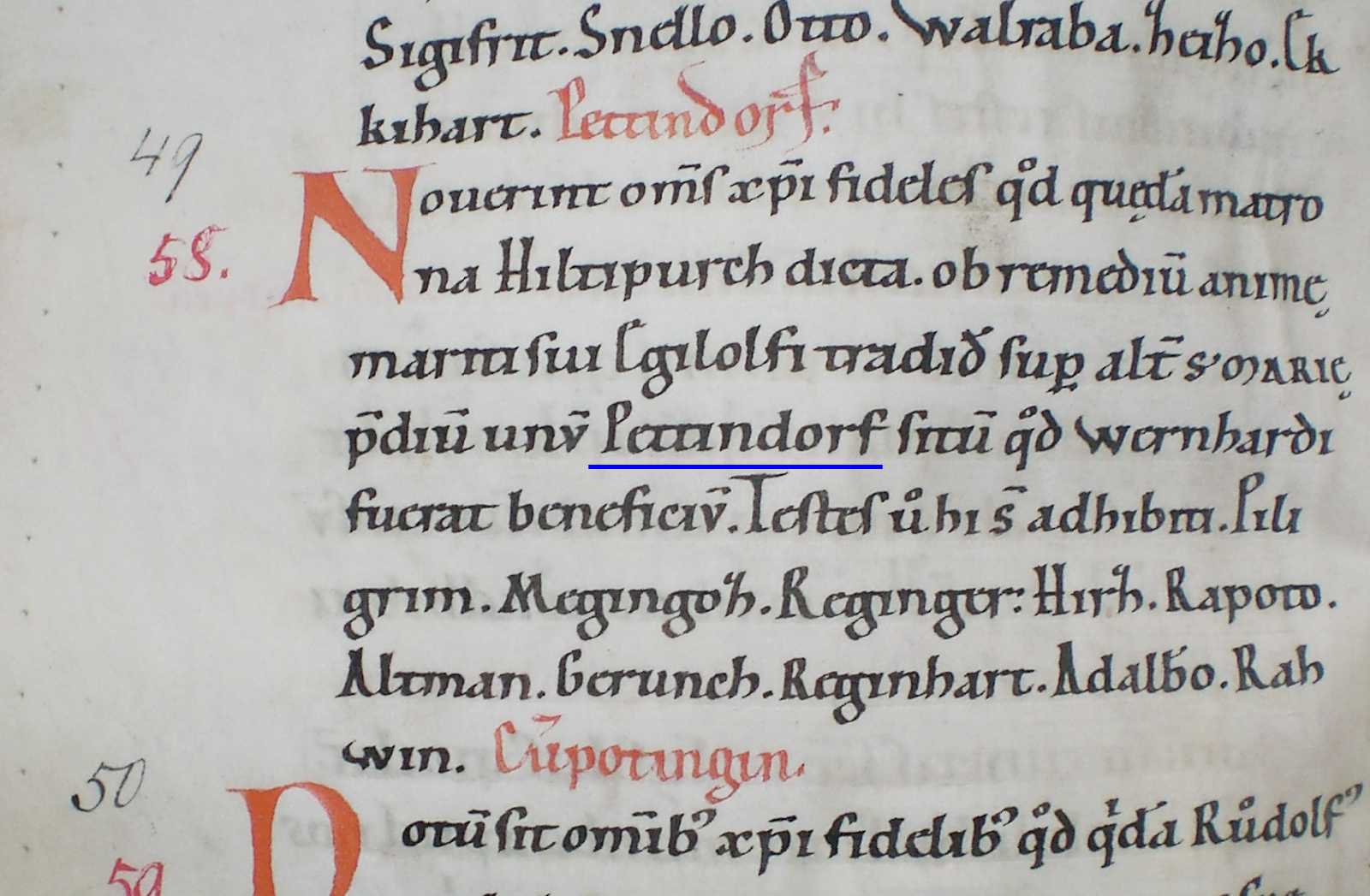 Erstmalige Erwähnung Pettendorfs im Traditionscodex des Stiftes Göttweig